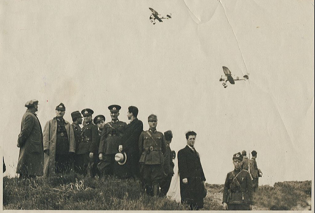 Mustafa Kemal Atatürk İstanbul Metris'te, Harp Akademileri Tatbikatları'nda komutanlarla birlikte. (28 Mayıs 1936)